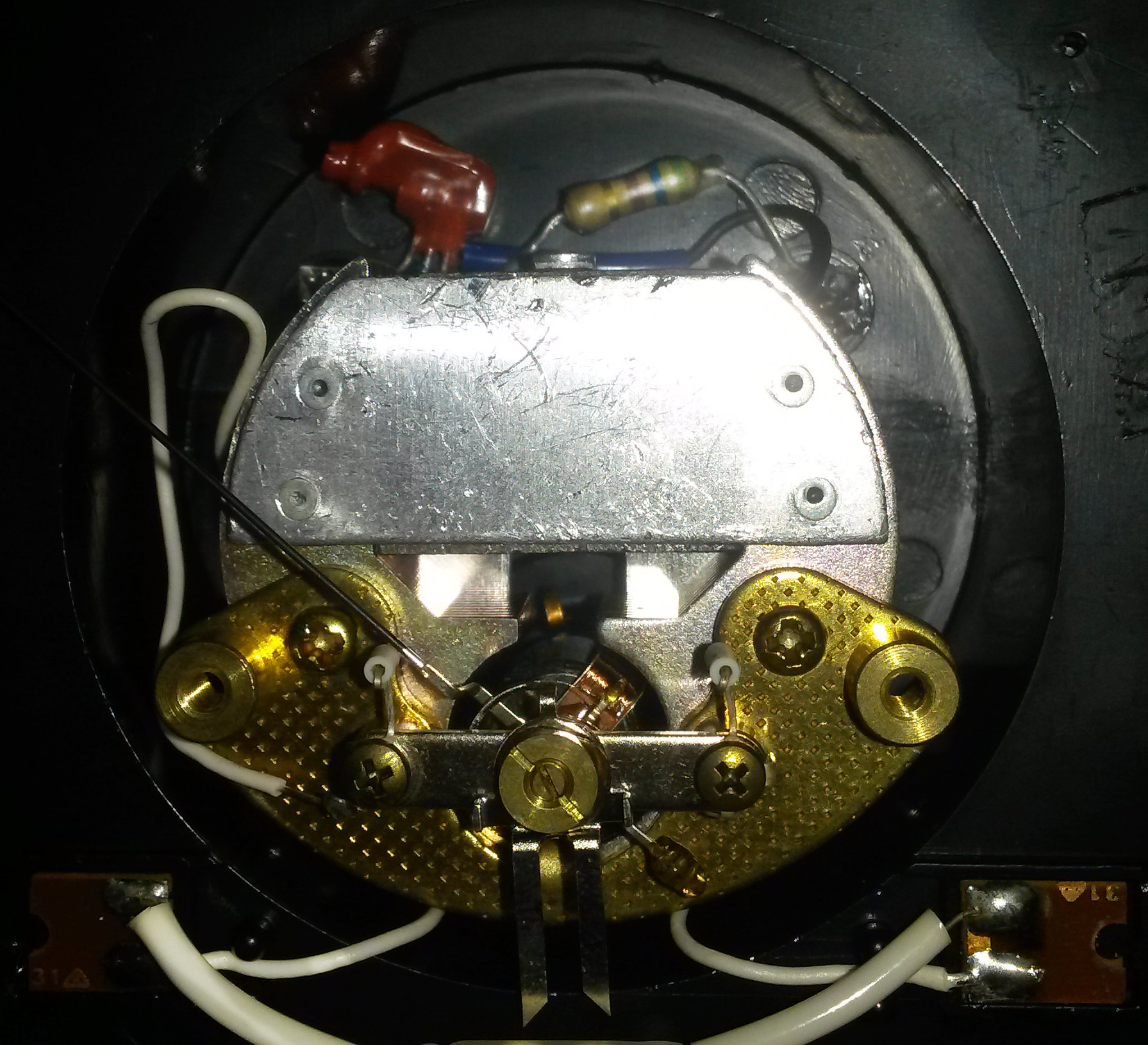 Vista interior de un vúmetro SVI TEAC